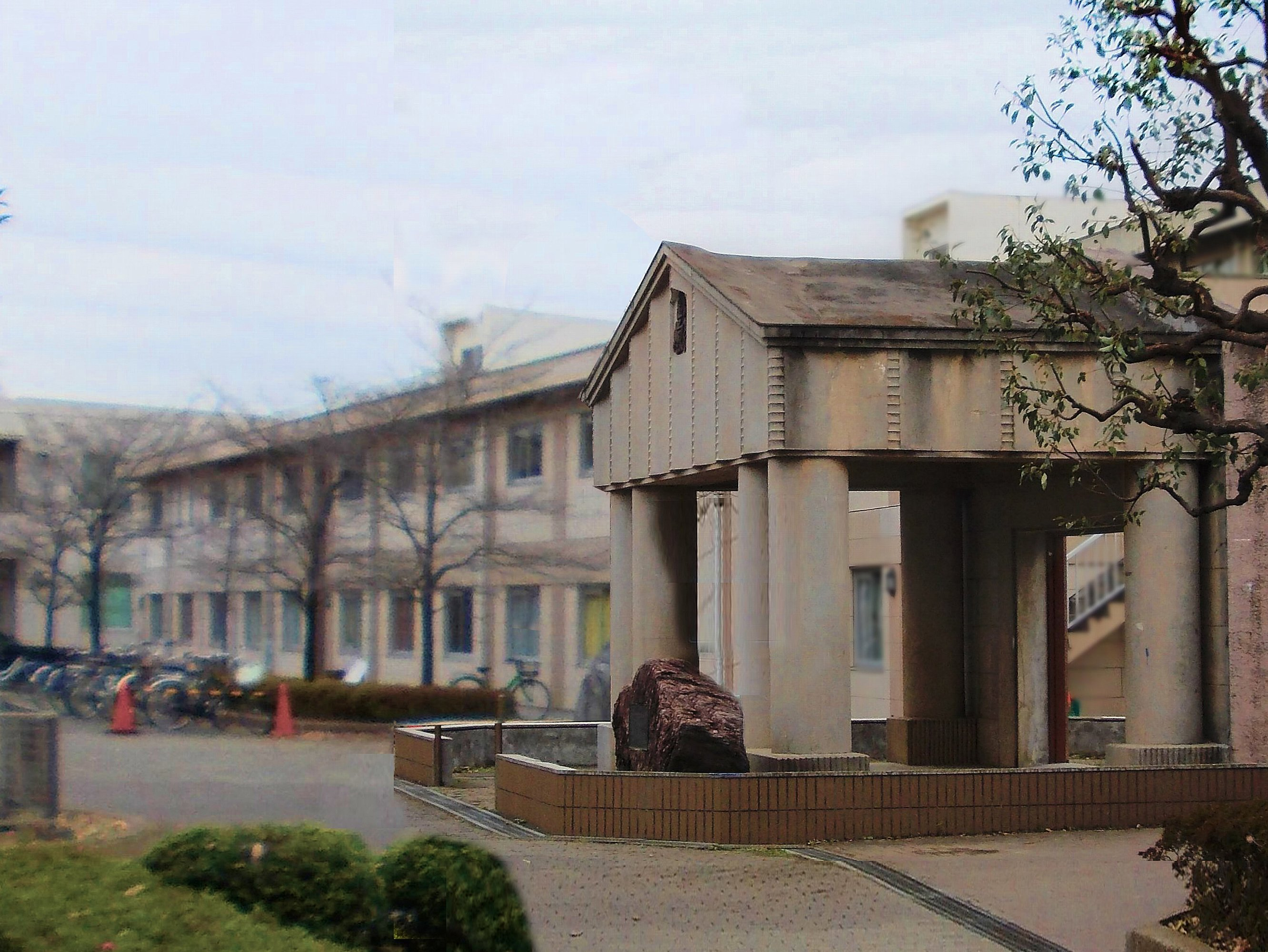 東葛飾高等学校（千葉県柏市）